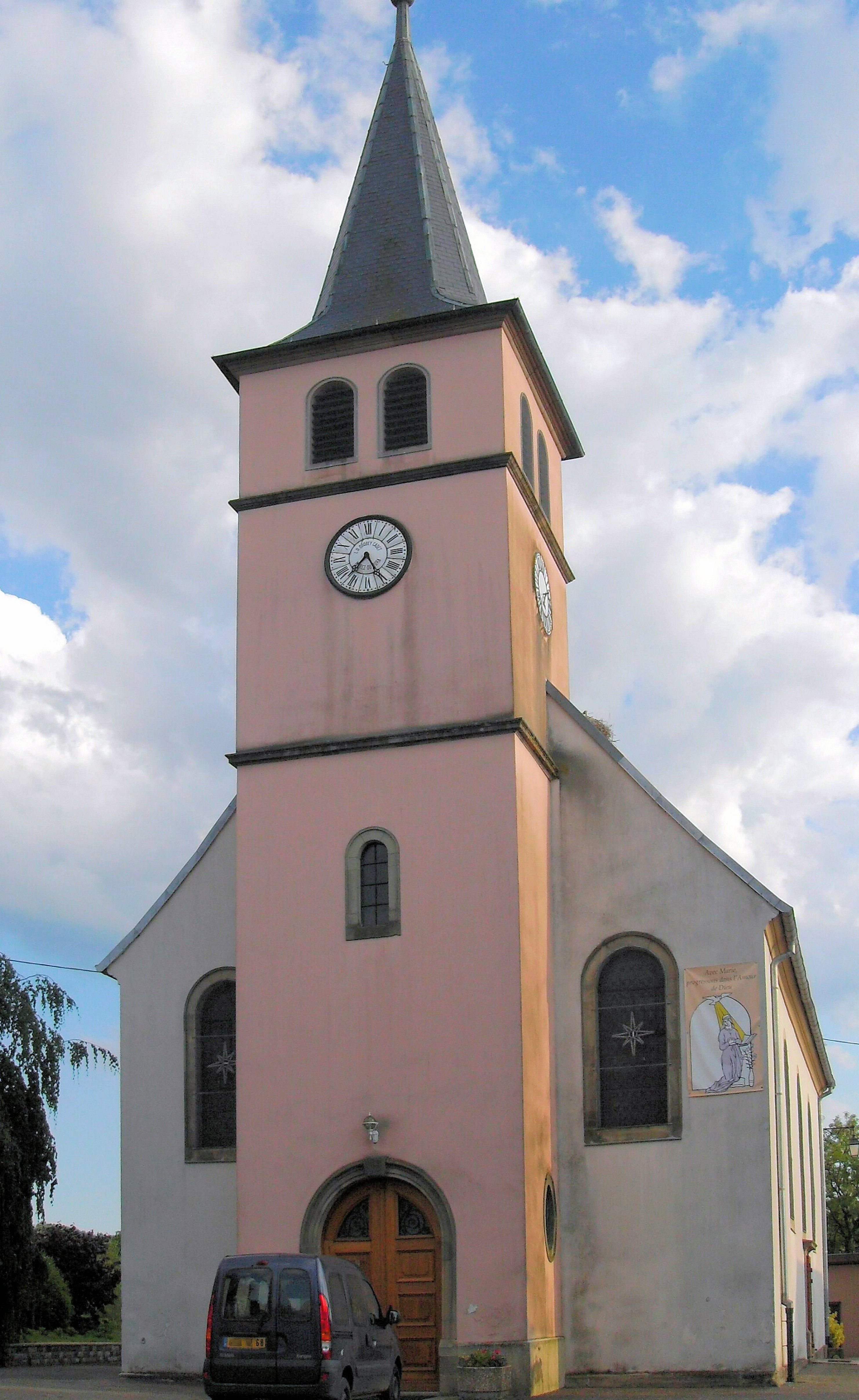 L'église Saint-Georges à Largitzen